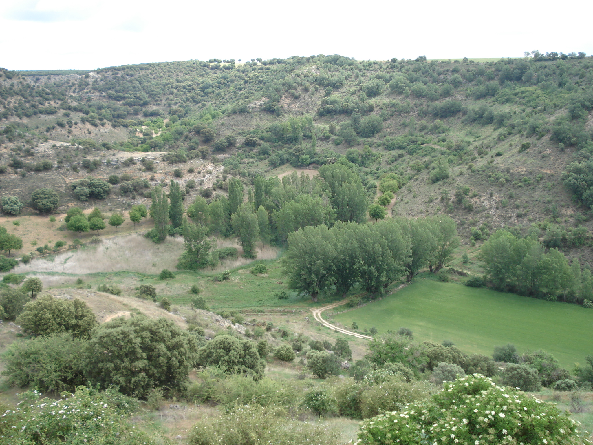 Nacimiento del Río Ungría en Fuentes de la Alcarria. En la foto se aprecia, a la izquierda de los chopos centenarios, el cañaveral bajo una chopera punto donde aflora el rio.